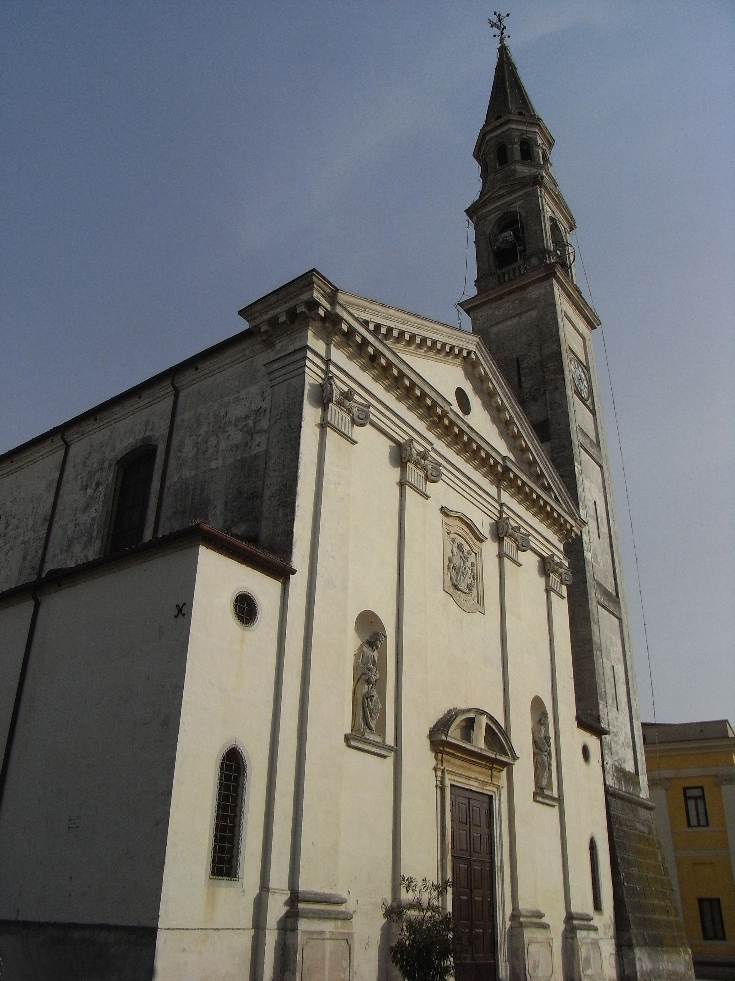 Camisano Vicentino Chiesa Parrocchiale San Nicolò Opera Propria 11 settembre 2008 Lingtft